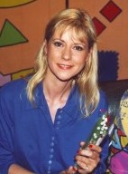 Dorothée, animatrice de télévision et chanteuse française.